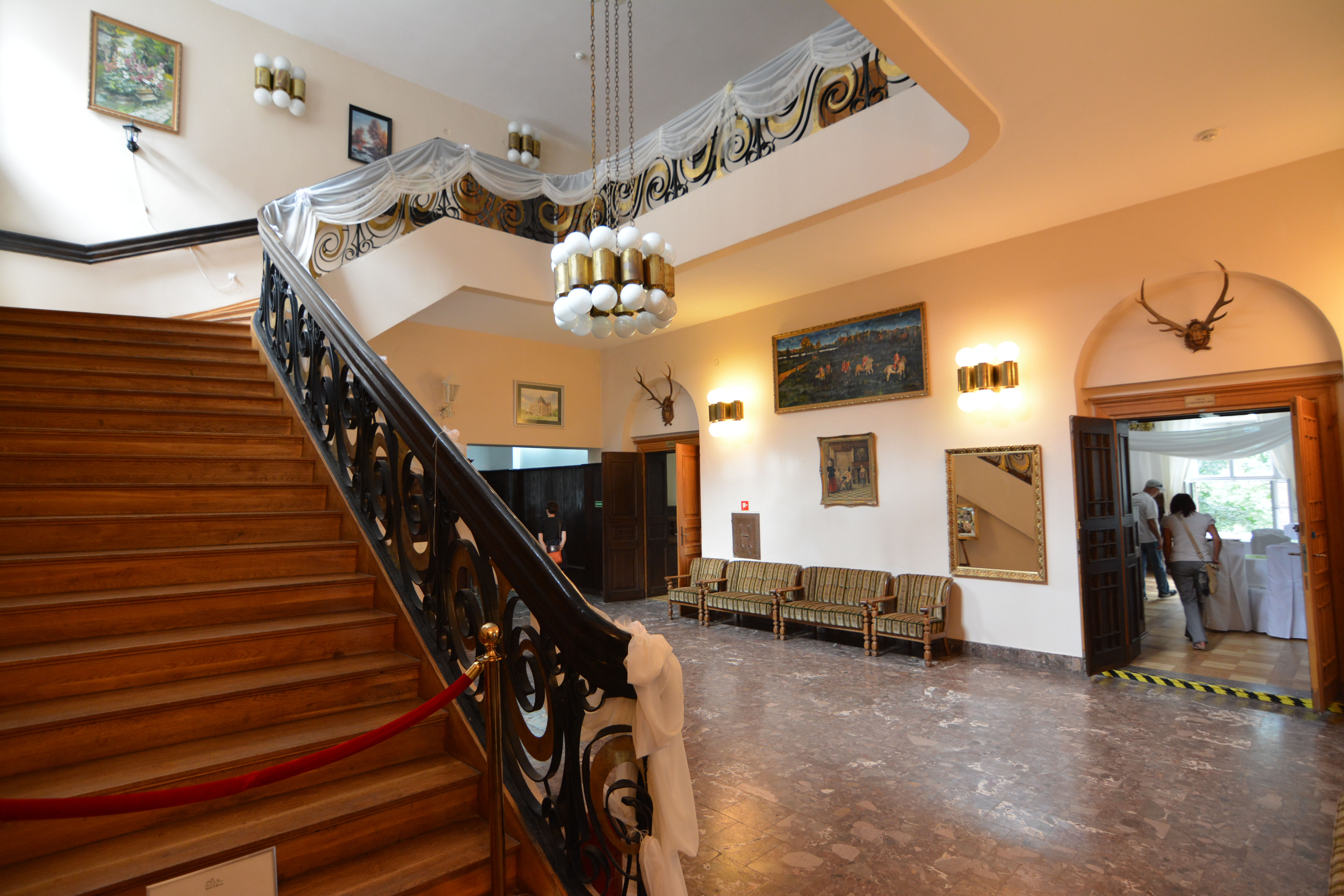 Pęzino - zamek, XIV, 1 poł. XVI, 1600, XIX